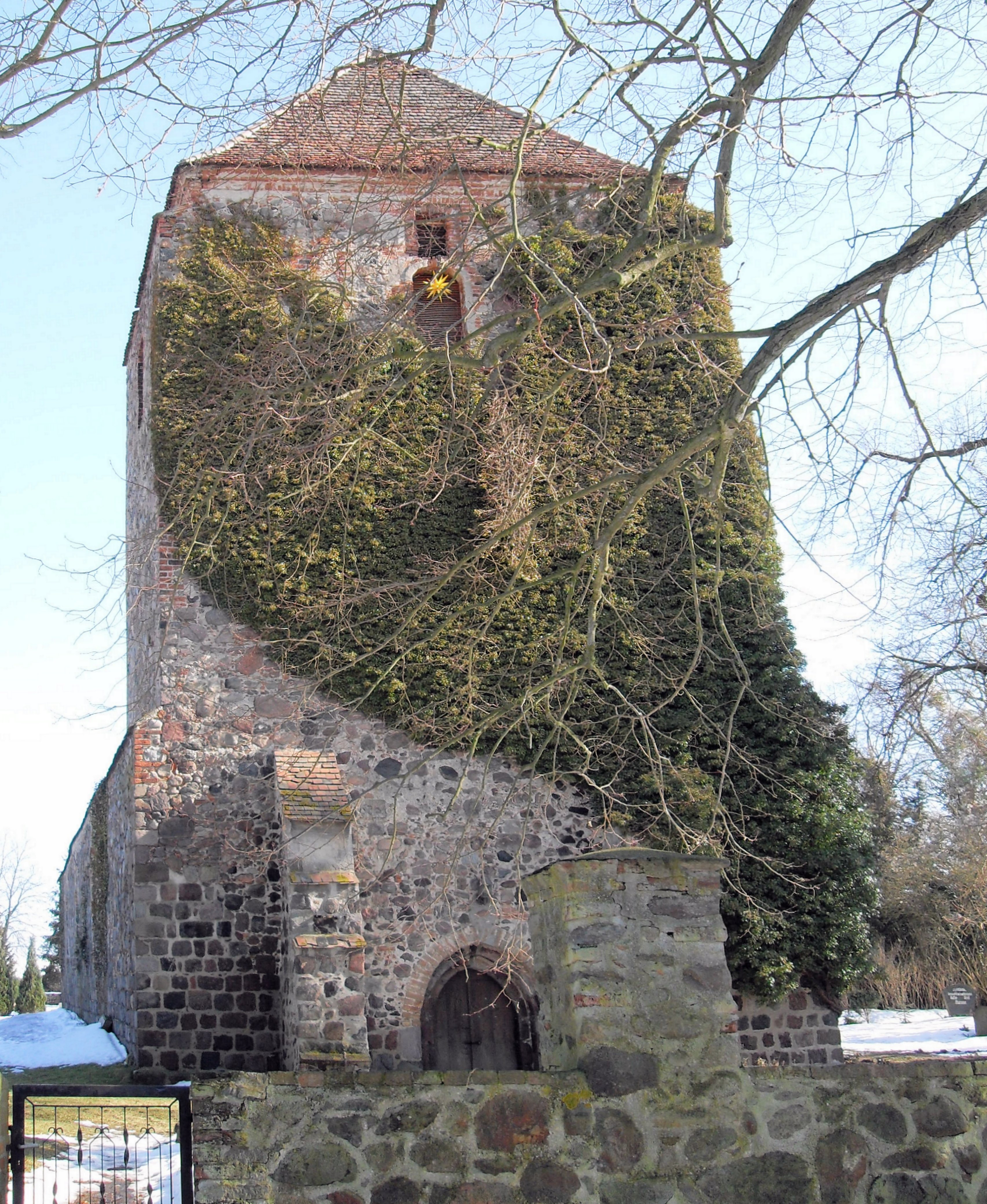 Kirche in Görlsdorf, Gemeinde Vierlinden, Deutschland